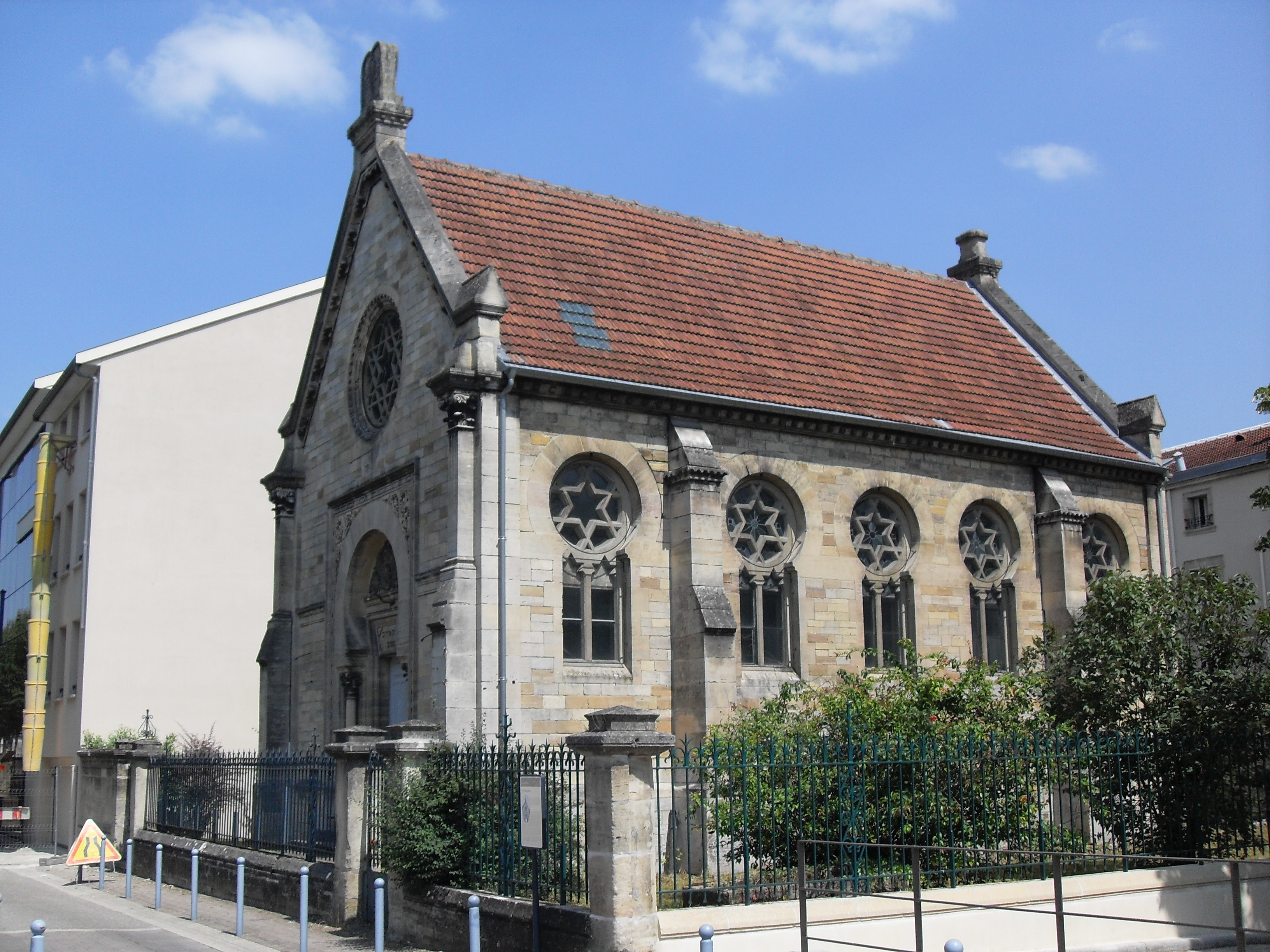 France, Bar-le-Duc, Meuse (55) - La synagogue.